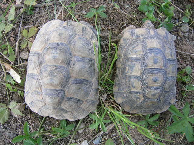 Testudo graeca, Lombardia, Italia